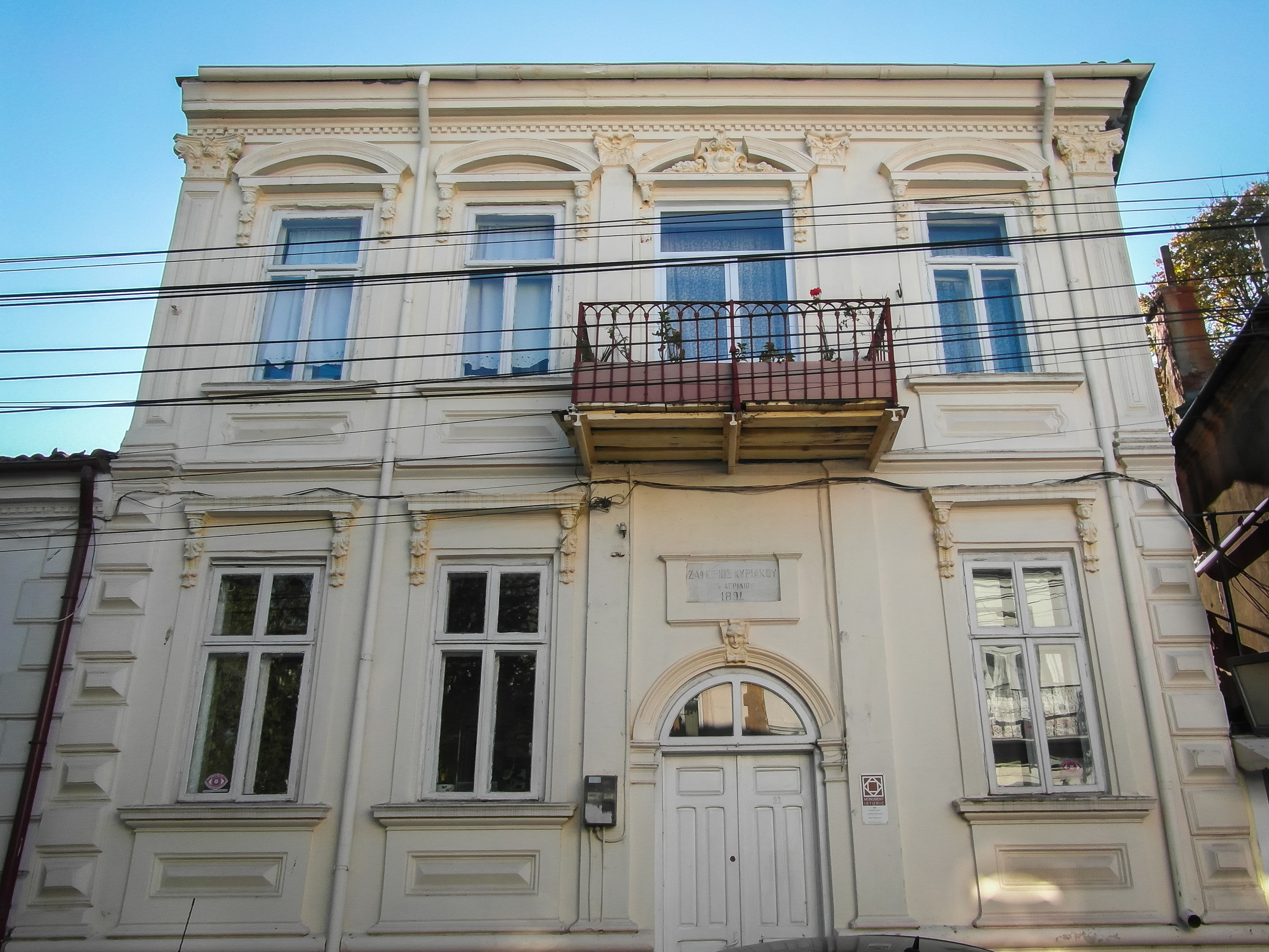 Casa Zafirios Kyryakos din Constanța se află pe Str. Ecaterina Varga 21.